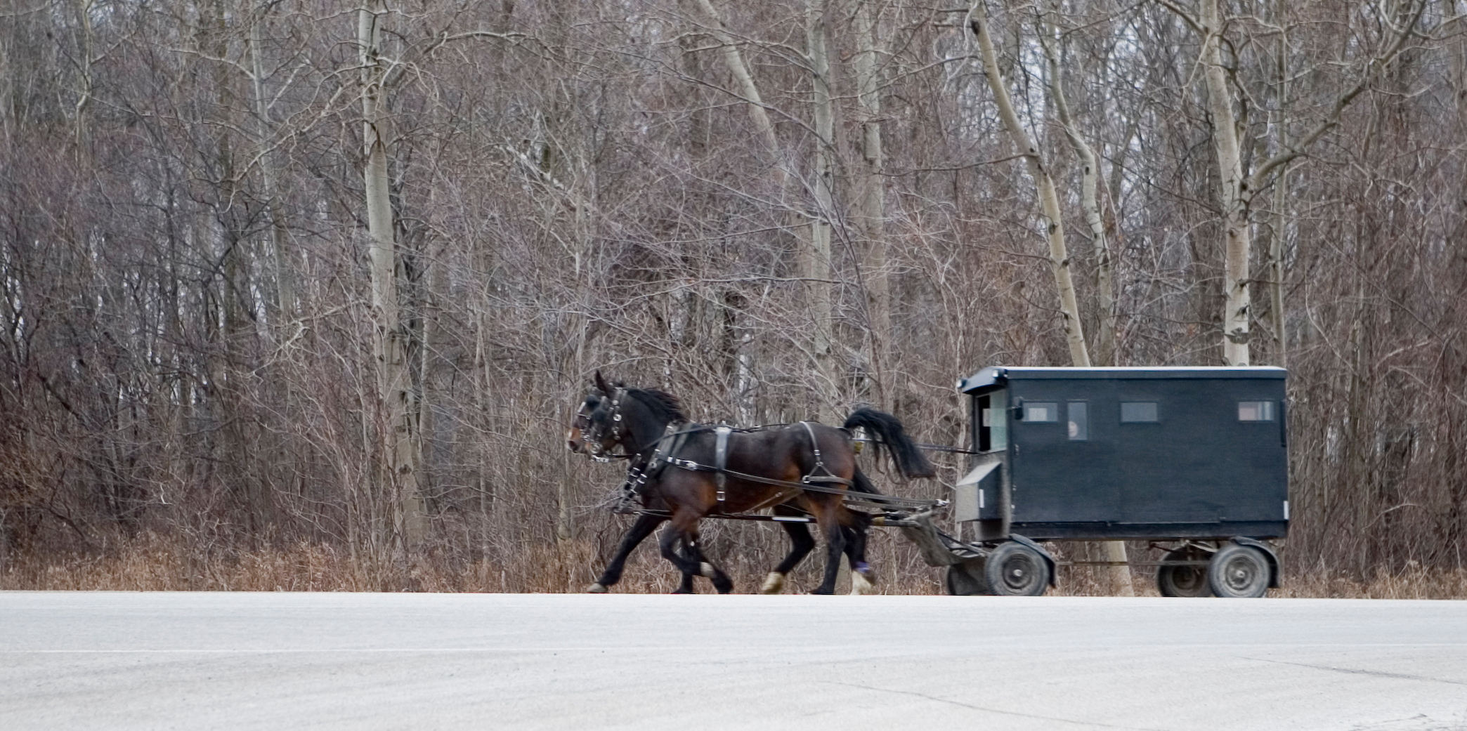 A Mennonite carriage in St. Jacobs, Ontario, Canada.